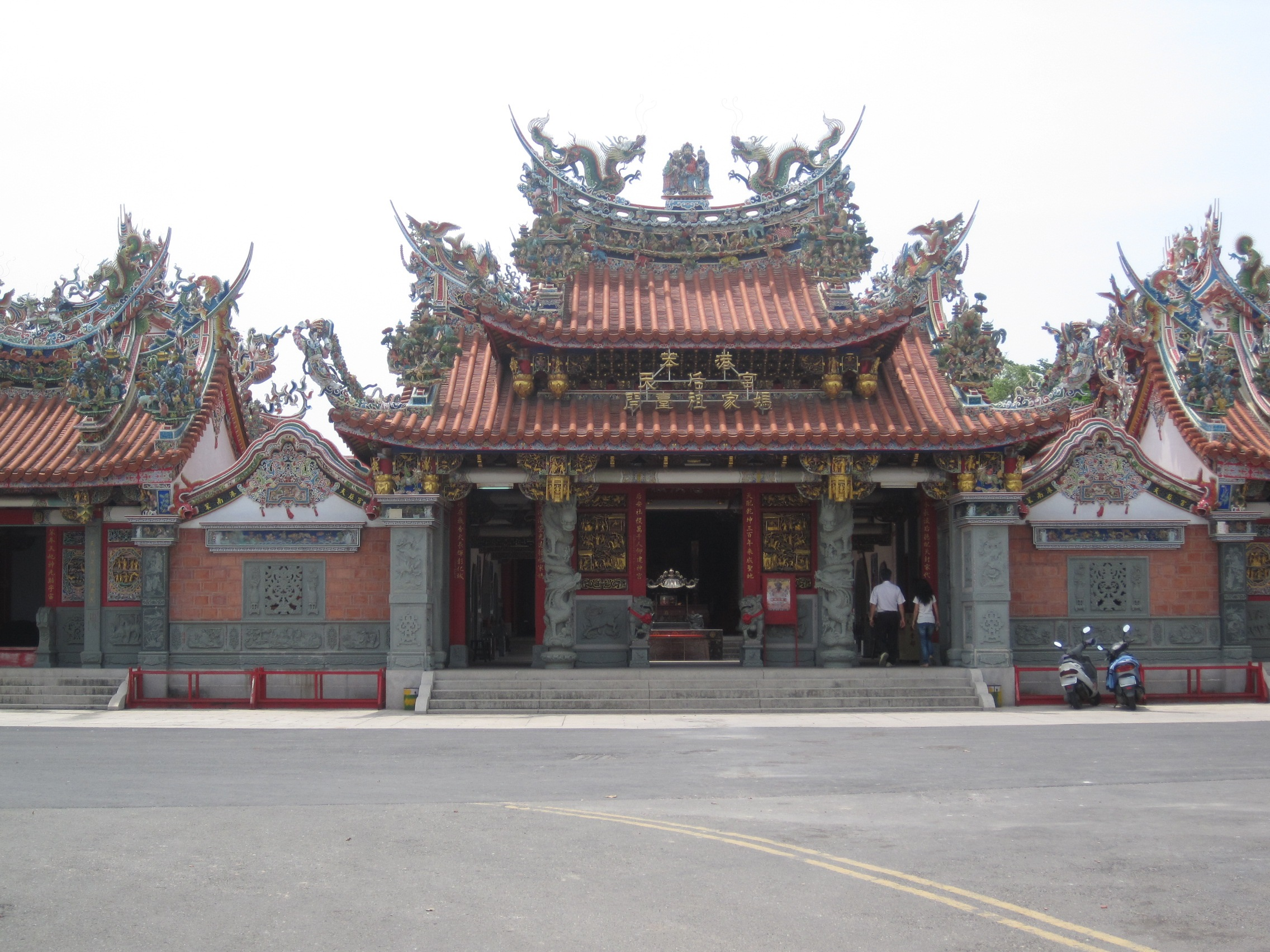 笨港天后宮，位於嘉義縣新港鄉